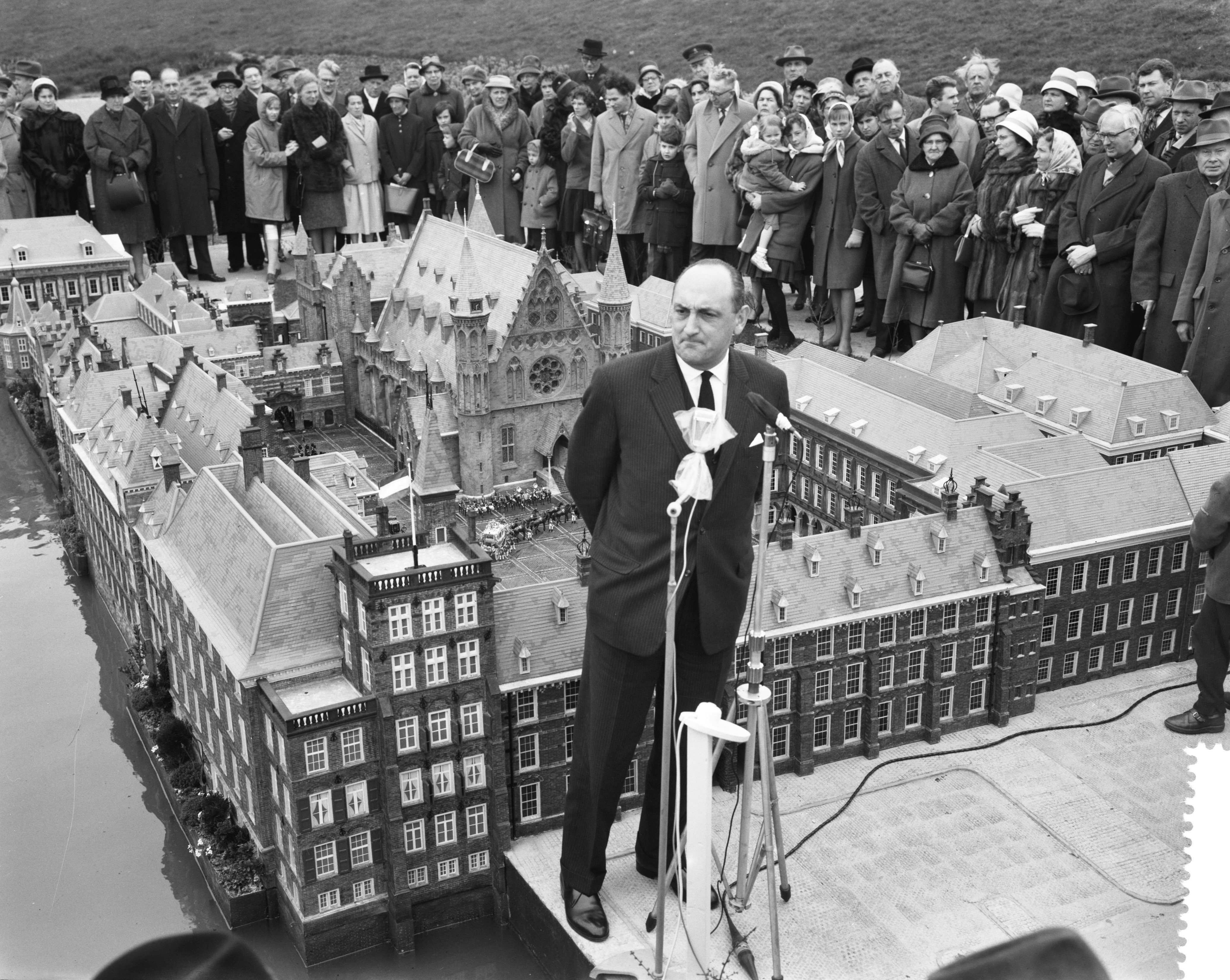 Collectie / Archief : Fotocollectie Anefo Reportage / Serie : [ onbekend ] Beschrijving : Opening Madurodam door Minister van Binnenlandse Zaken Mr. E. H. Toxopeus Datum : 29 maart 1961 Locatie : Den Haag, Zuid-Holland Trefwoorden : Openingen Persoonsnaam : Toxopeus, Edzo Fotograaf : Rossem, Wim van / Anefo Auteursrechthebbende : Nationaal Archief Materiaalsoort : Negatief (zwart/wit) Nummer archiefinventaris : bekijk toegang 2.24.01.04 Bestanddeelnummer : 912-2852